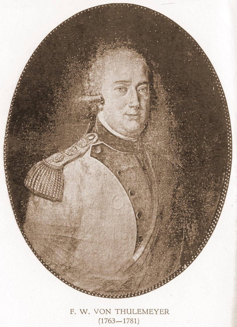 Friedrich Wilhelm von Thulemeyer (1735-1811), Diplomat, Justizminister und Musikaliensammler